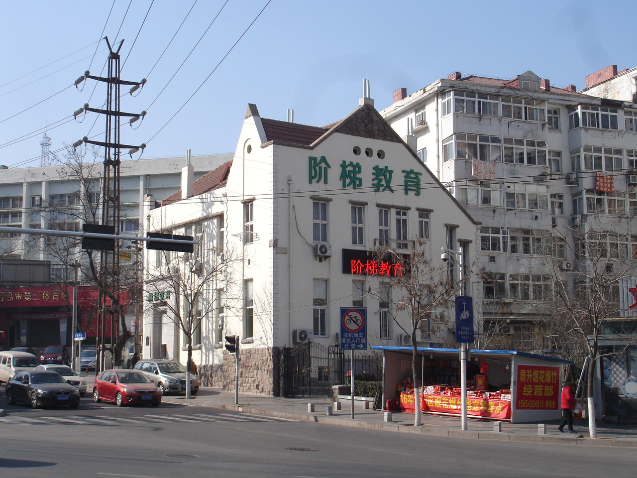 青岛邮便局大和町分所旧址